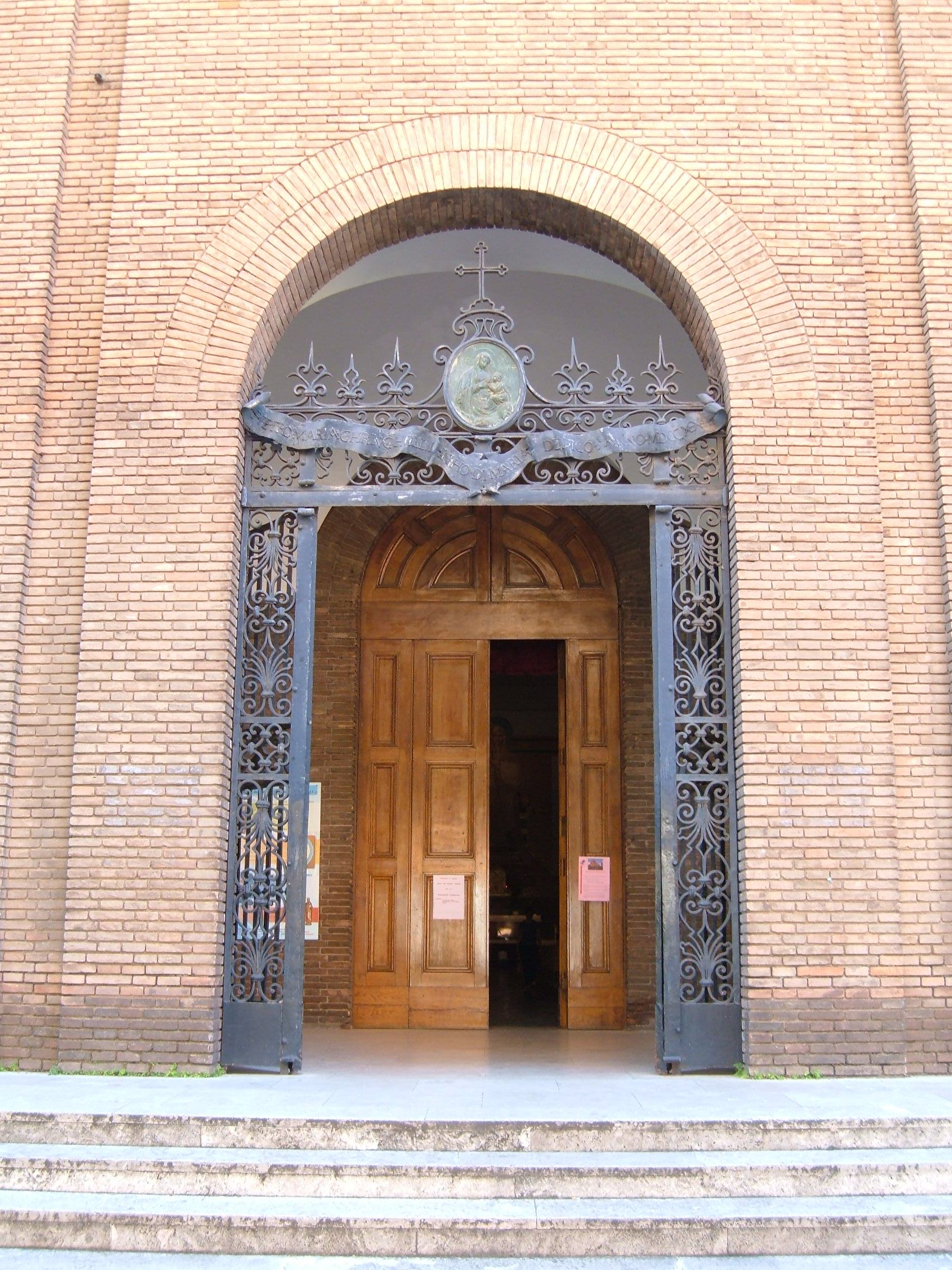 Chiesa di Santa Maria regina Pacis, a Roma, nel quartiere Gianicolense.